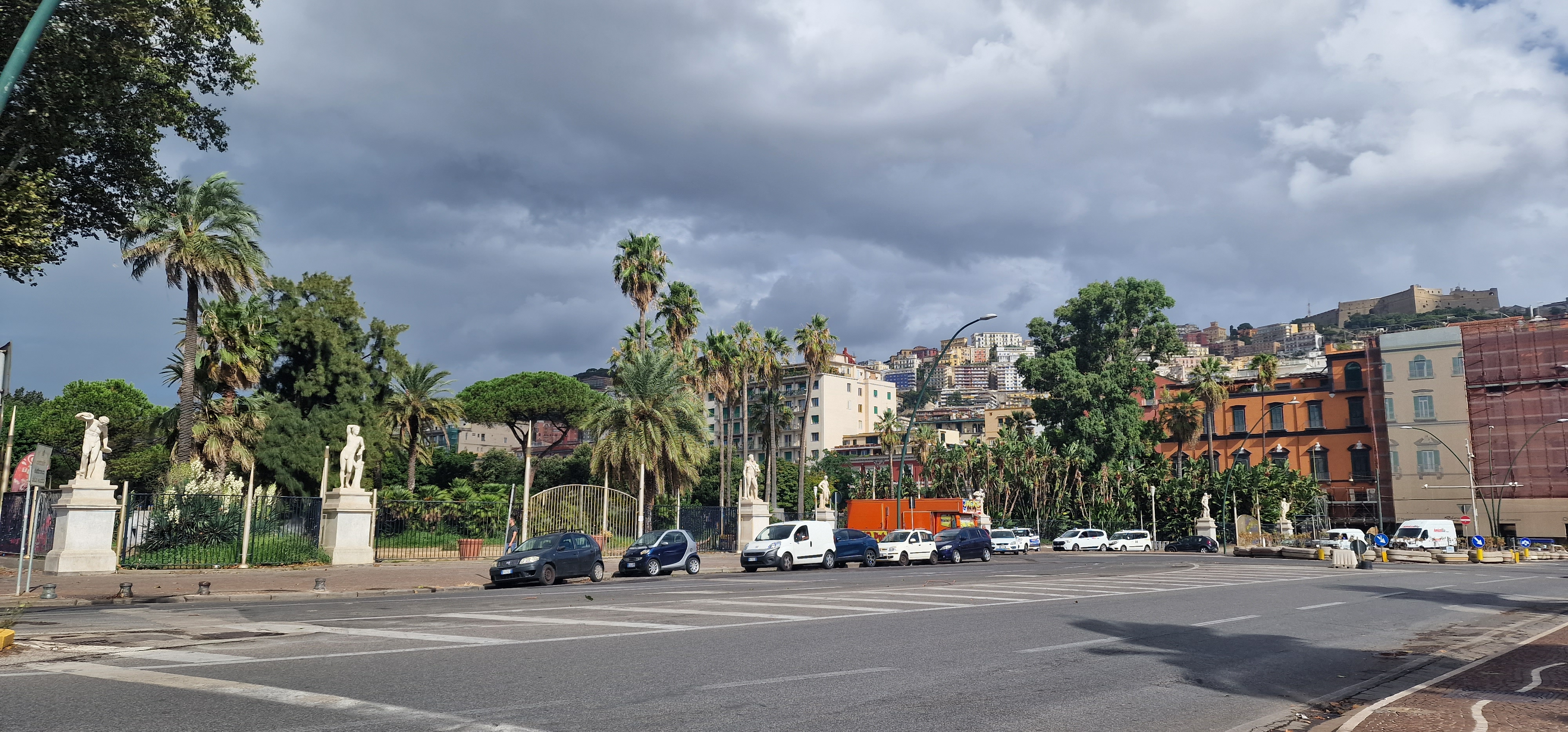 Piazza della Vittoria, Naples